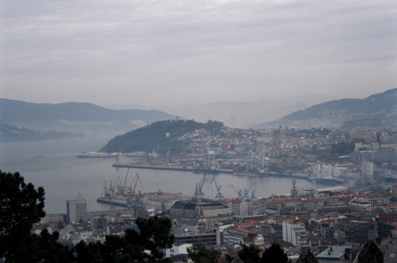 Panorámica de Vigo